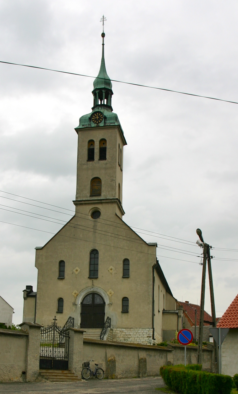 Kościół par. pw. śś. Fabiana i Sebastiana w Kórnicy (niem. Körnitz) w gminie Krapkowice.